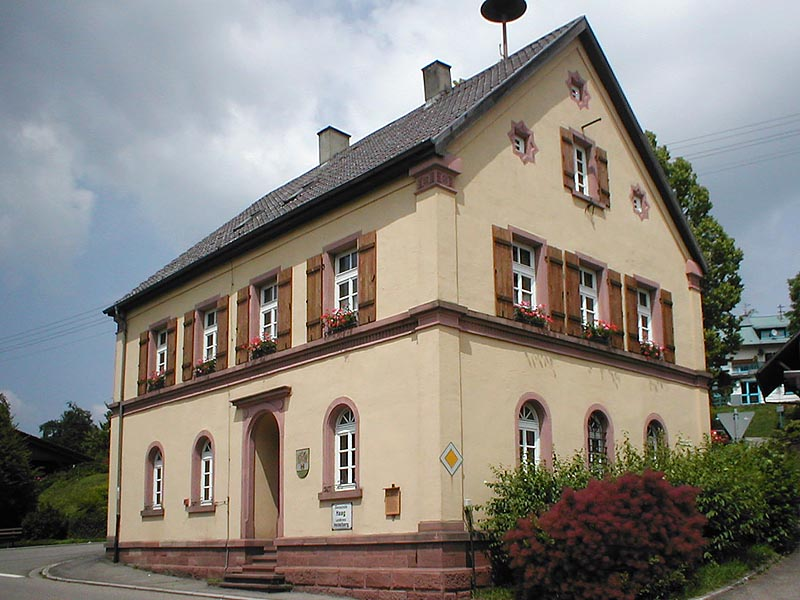 Altes Rathaus in Schönbrunn-Haag